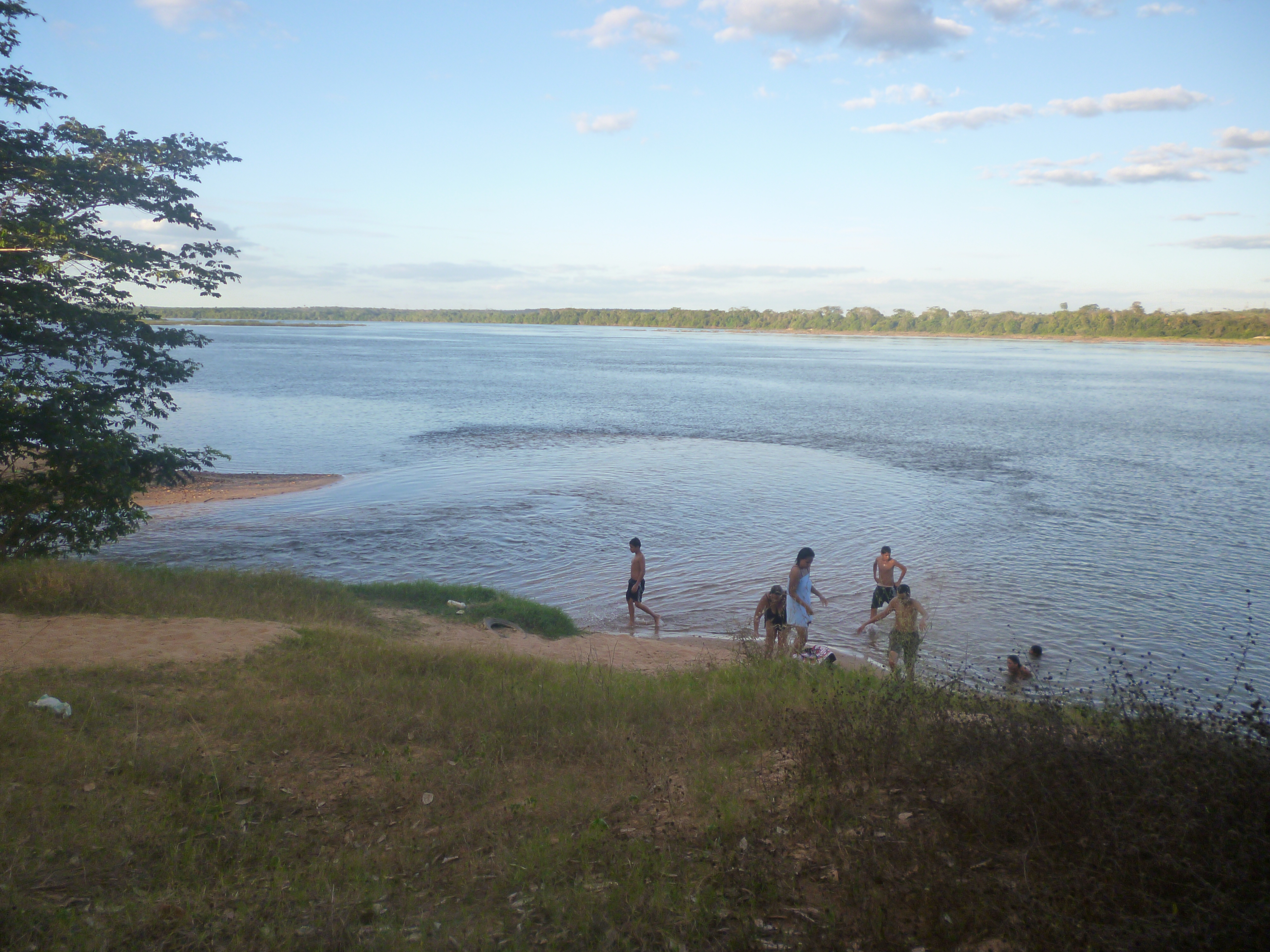 Encontro do Ribeirão Grande com Rio Tocantins(Ceota)